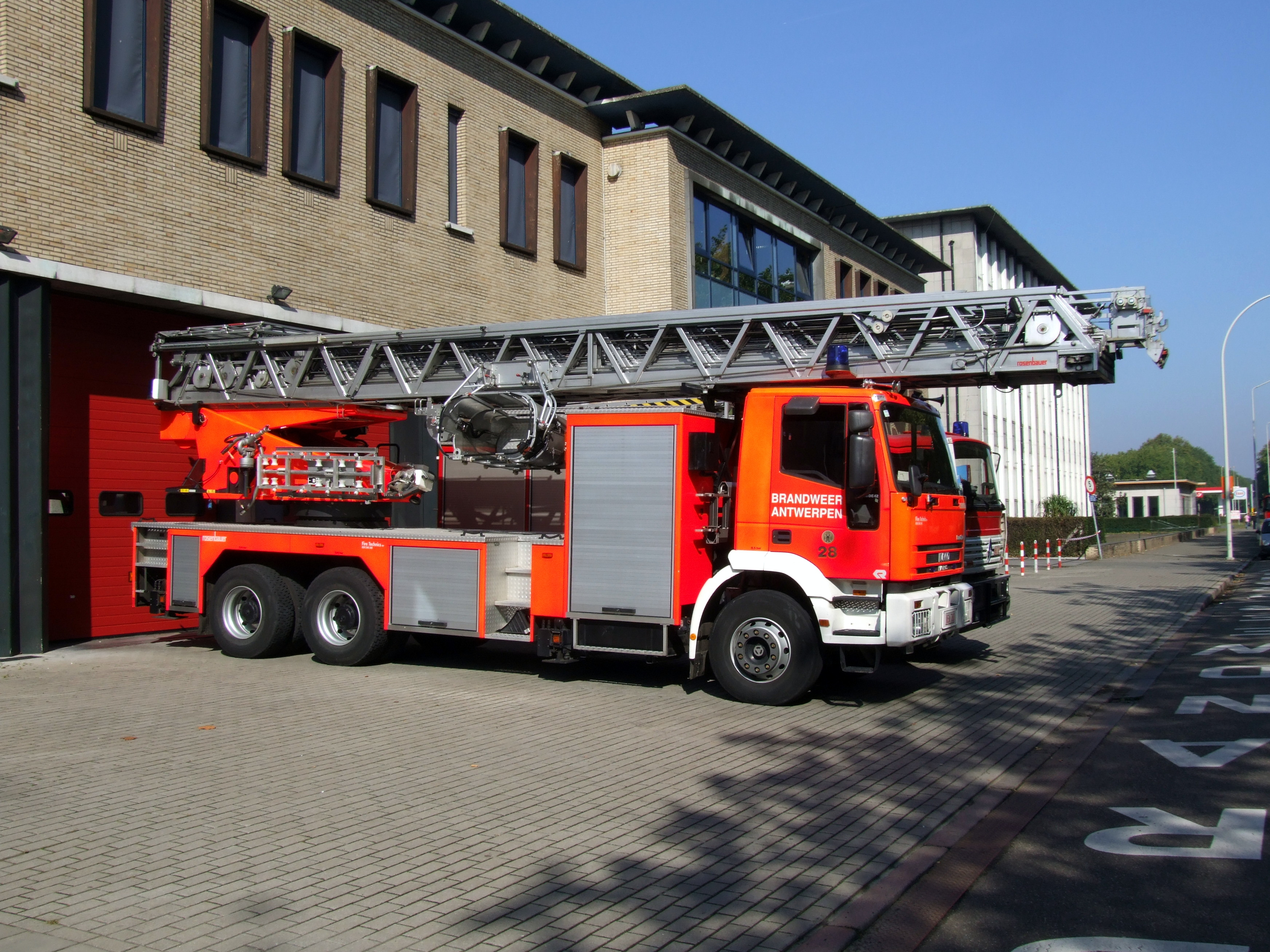 Iveco Magirus, Eurofire, Brandweer Antwerpen